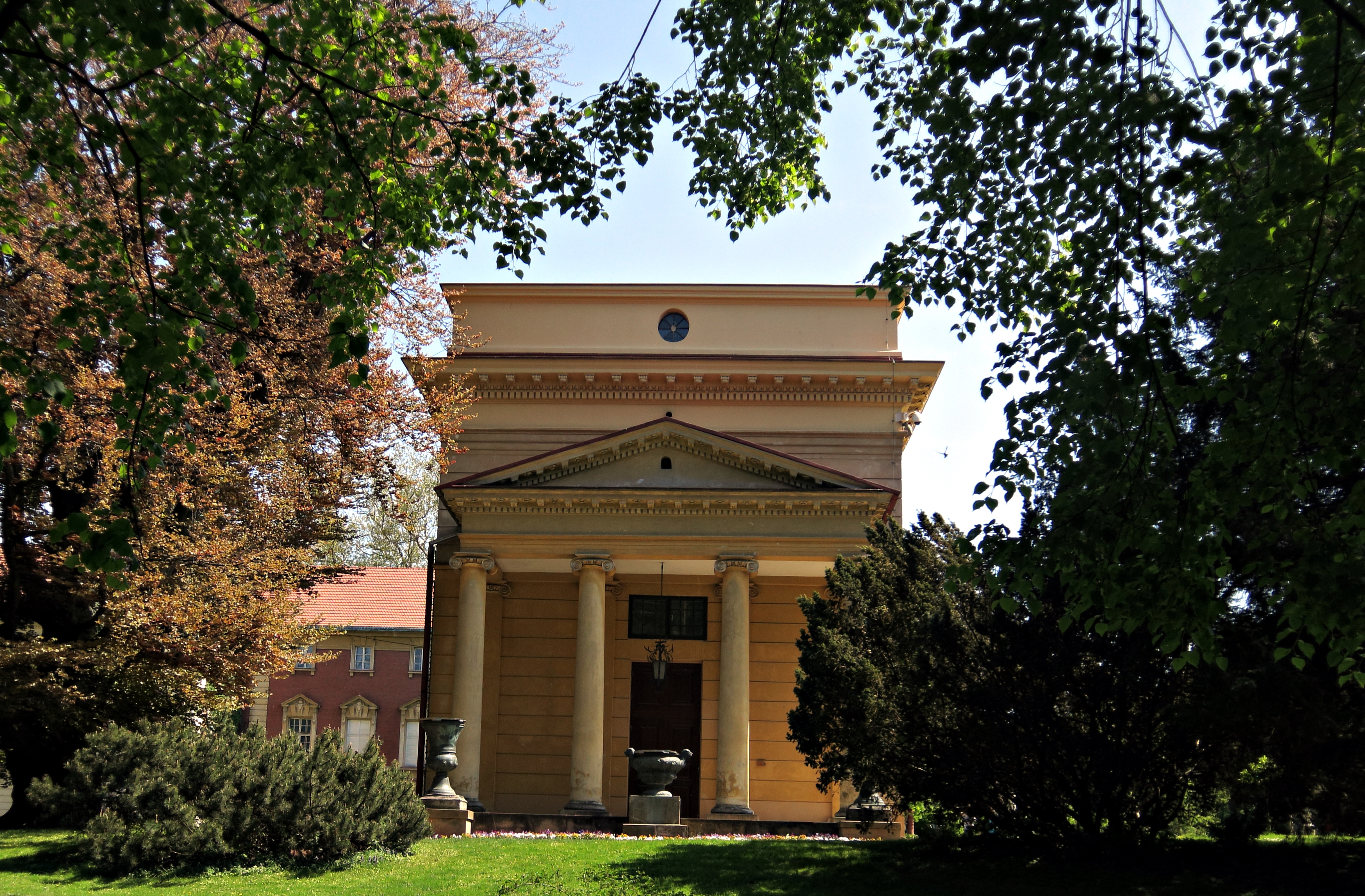 Łańcut, Zamek w Łańcucie